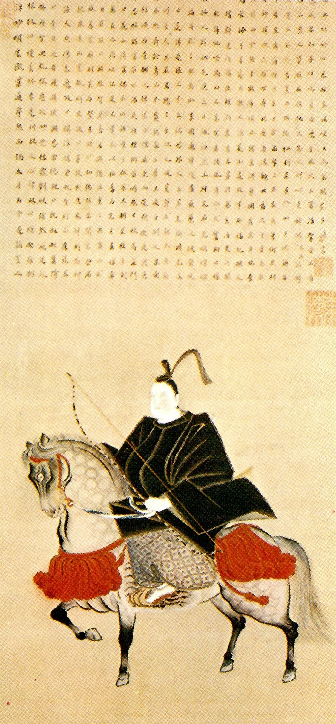 伊達光宗の肖像。